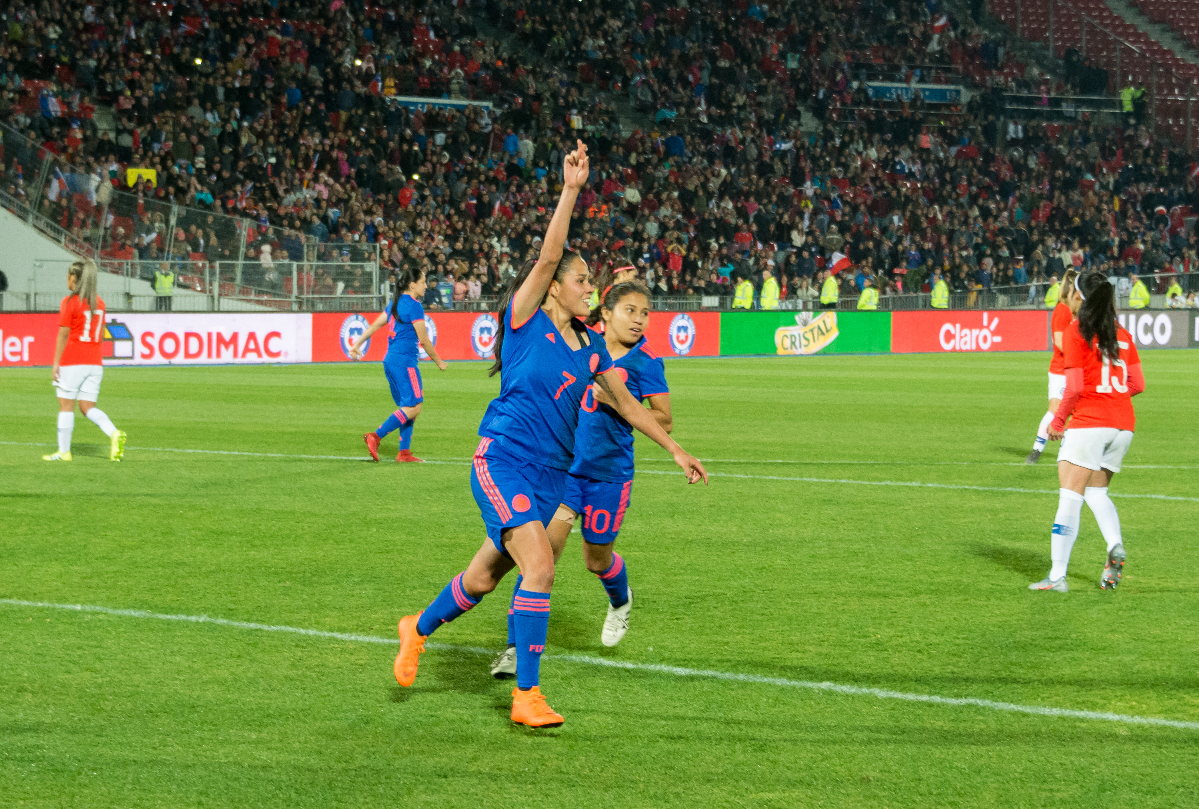 Marcela Restrepo y Leicy Santos, Chile v Colombia, Estadio Nacional, Ñuñoa, Santiago, Chile.